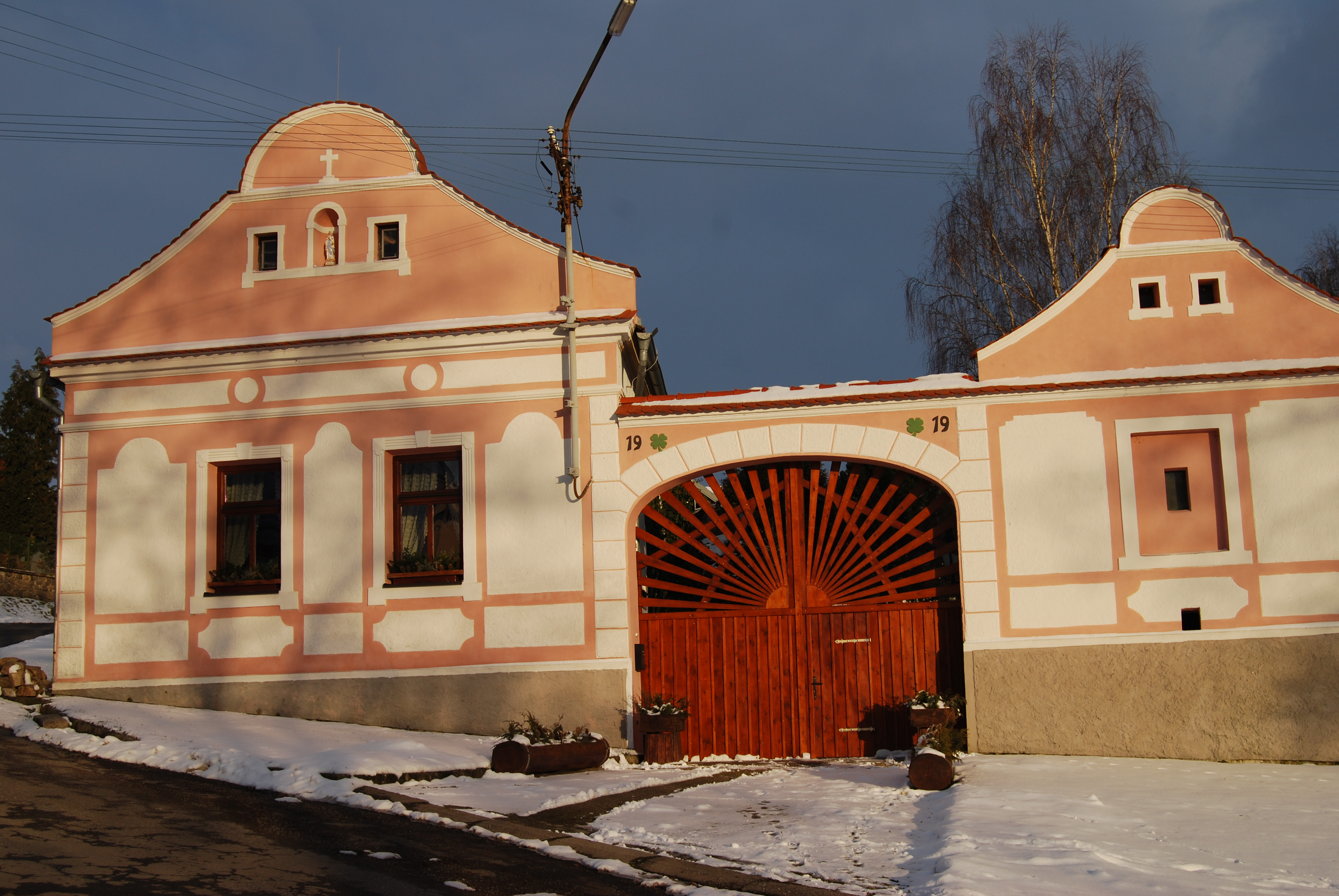 Venkovská usedlost čp. 19. Tukleky (Oslov). Okres Písek. Česká republika.